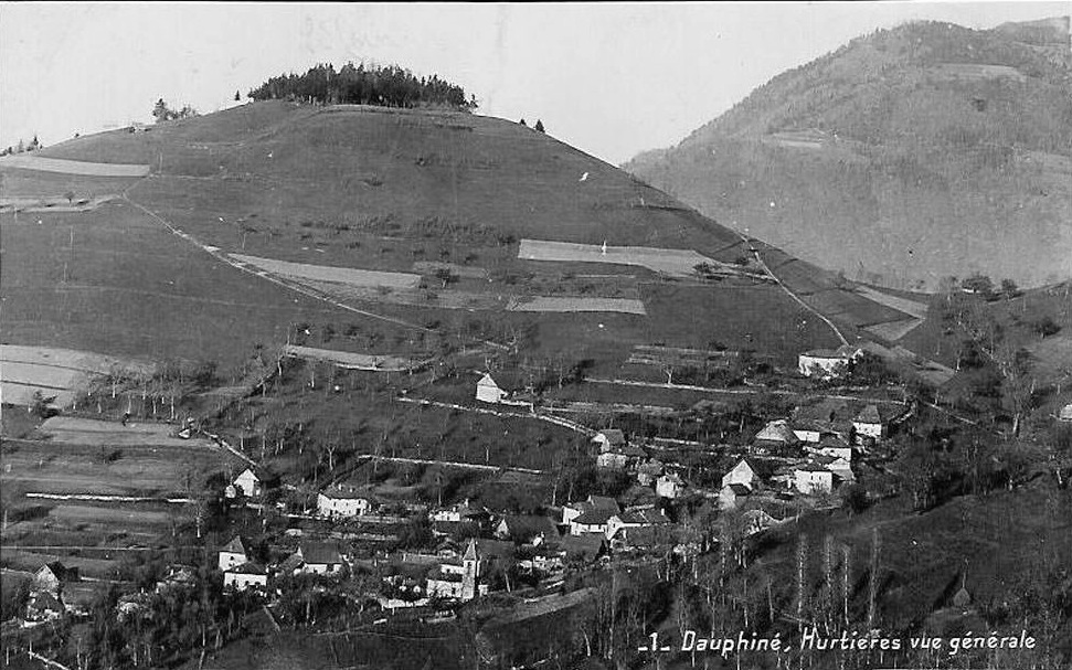 Hurtières (Isère) vue générale. carte postale ancienne.